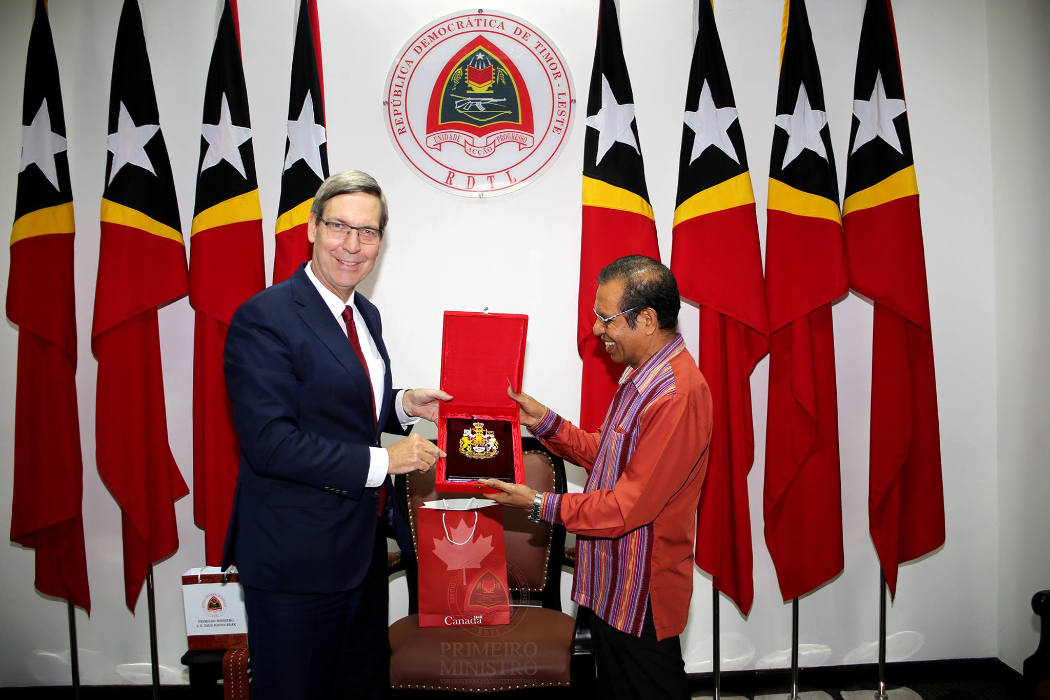 Peter MacArthur, kanadischer Diplomat, und Osttimors Premierminister Taur Matan Ruak